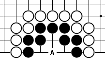 笠帽四(圍棋)